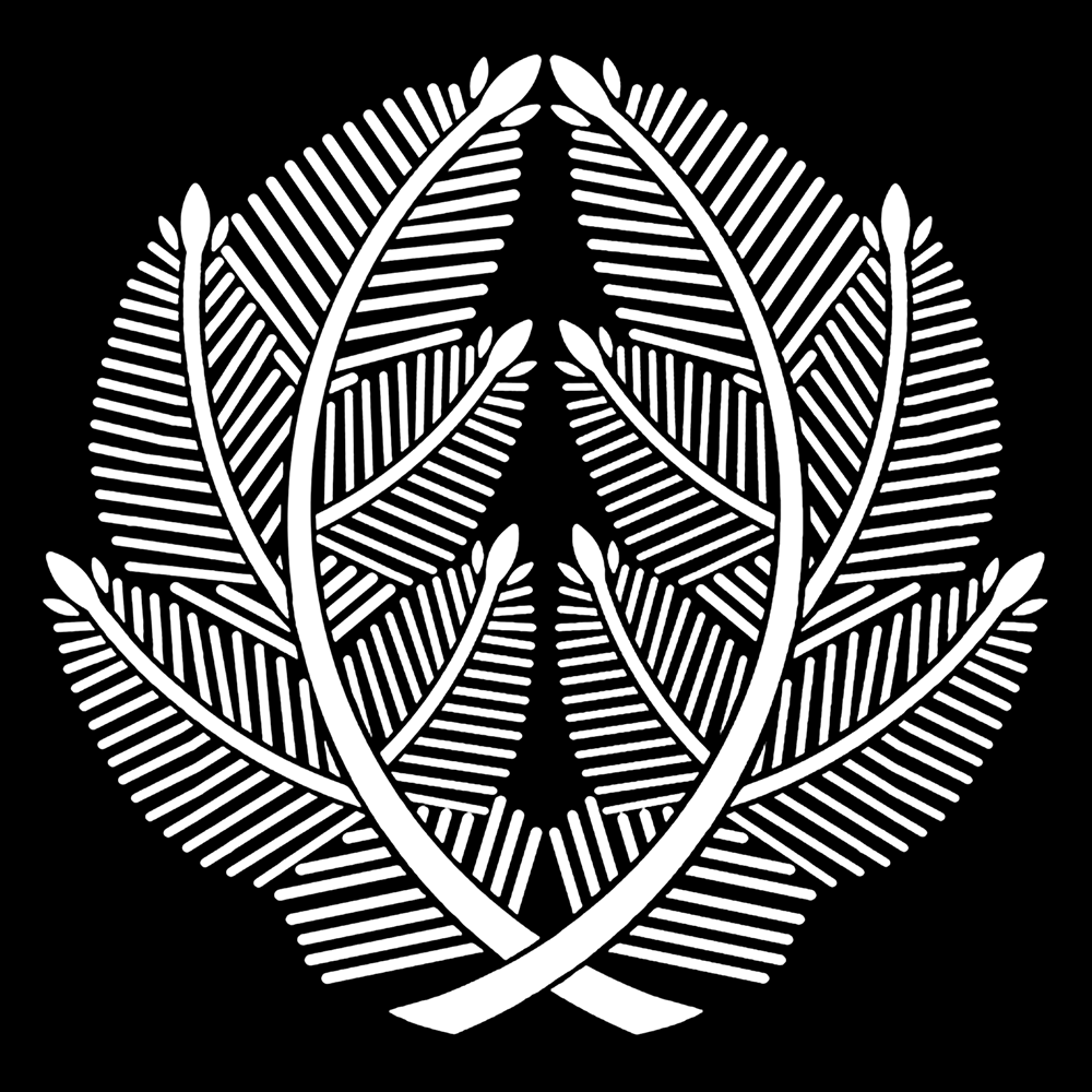 「抱き若松」紋（染抜）